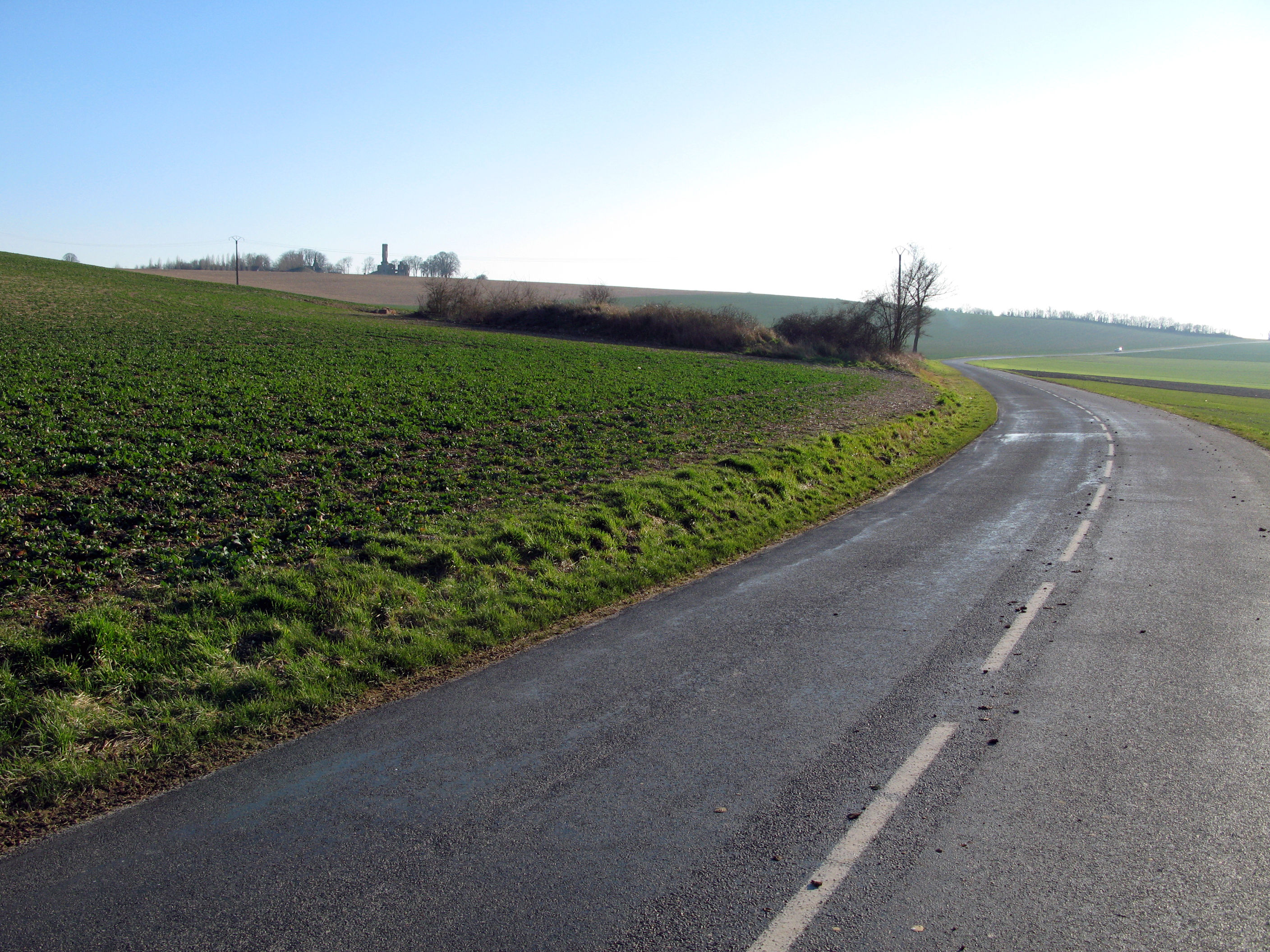 Folleville (Somme, France) - Les vestiges du château, vus depuis la route de Sourdon. . .